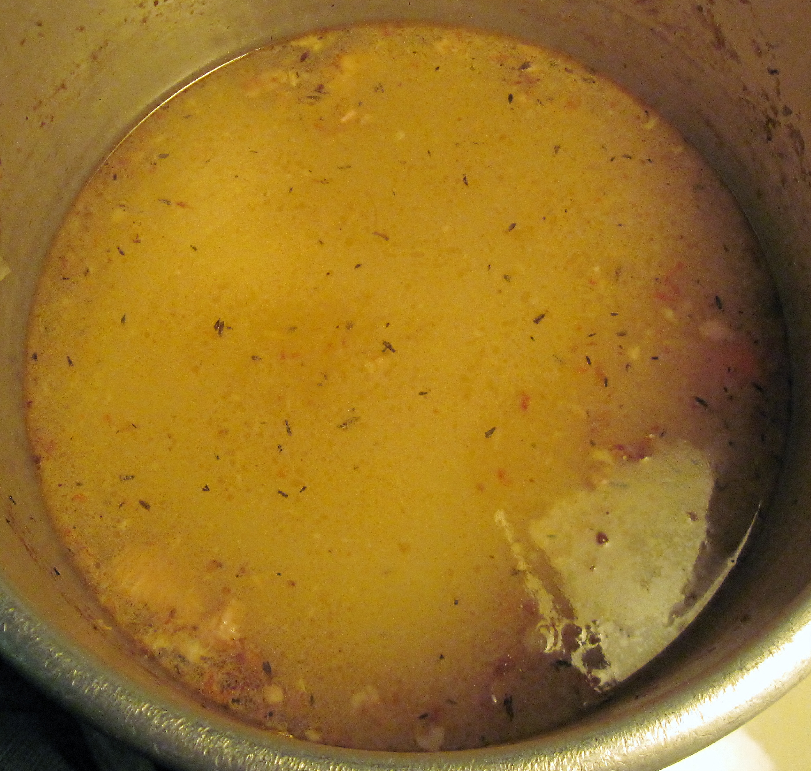 "Hausgemachter" Geflügelfond.